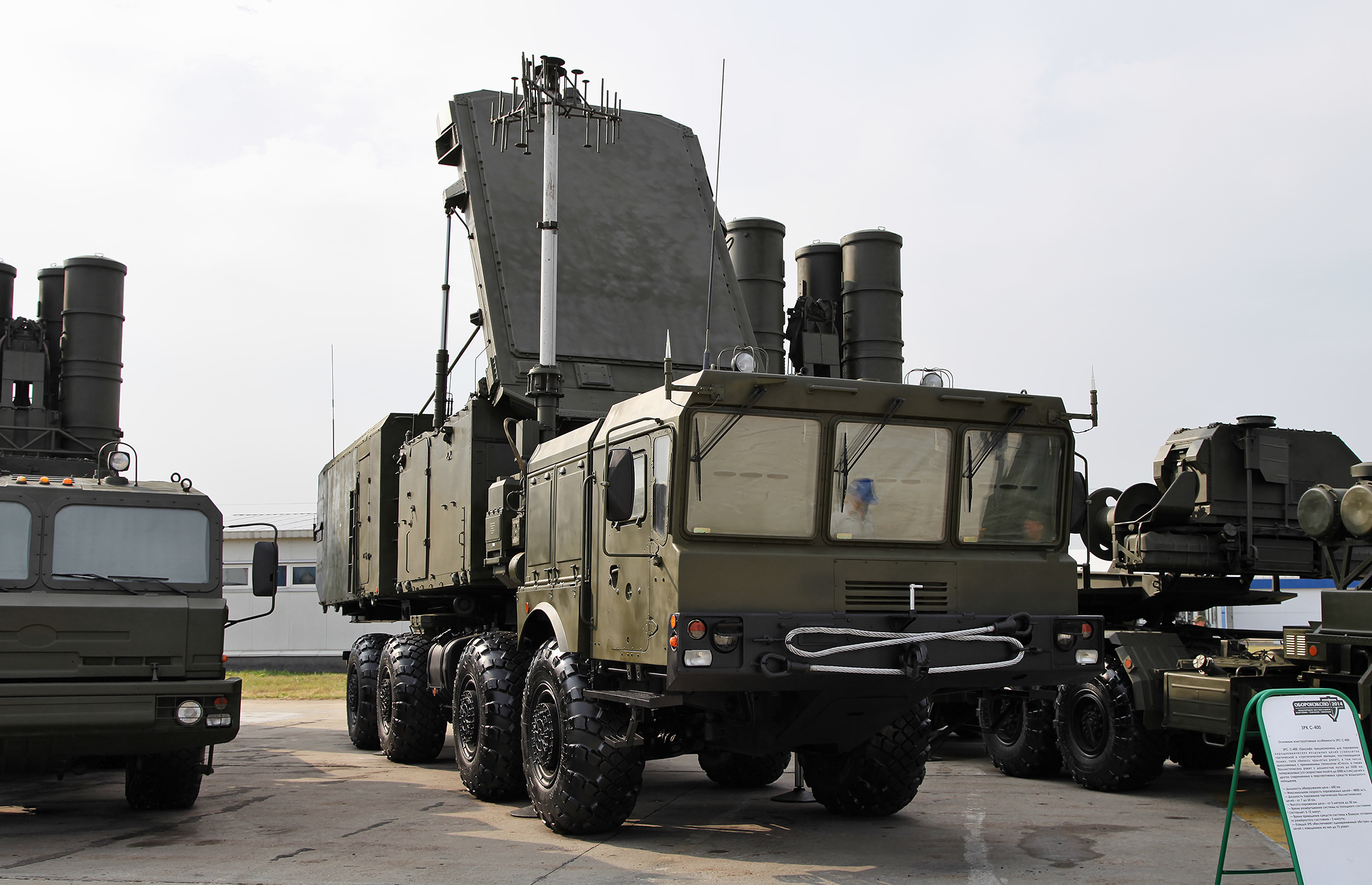 РПН 92Н2 и пусковая уставновка 5П85Т2 из состава ЗРС С-400 (92N2 radar and 5P85T2 from S-400)